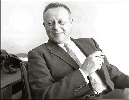 Foto van Karel Bossart